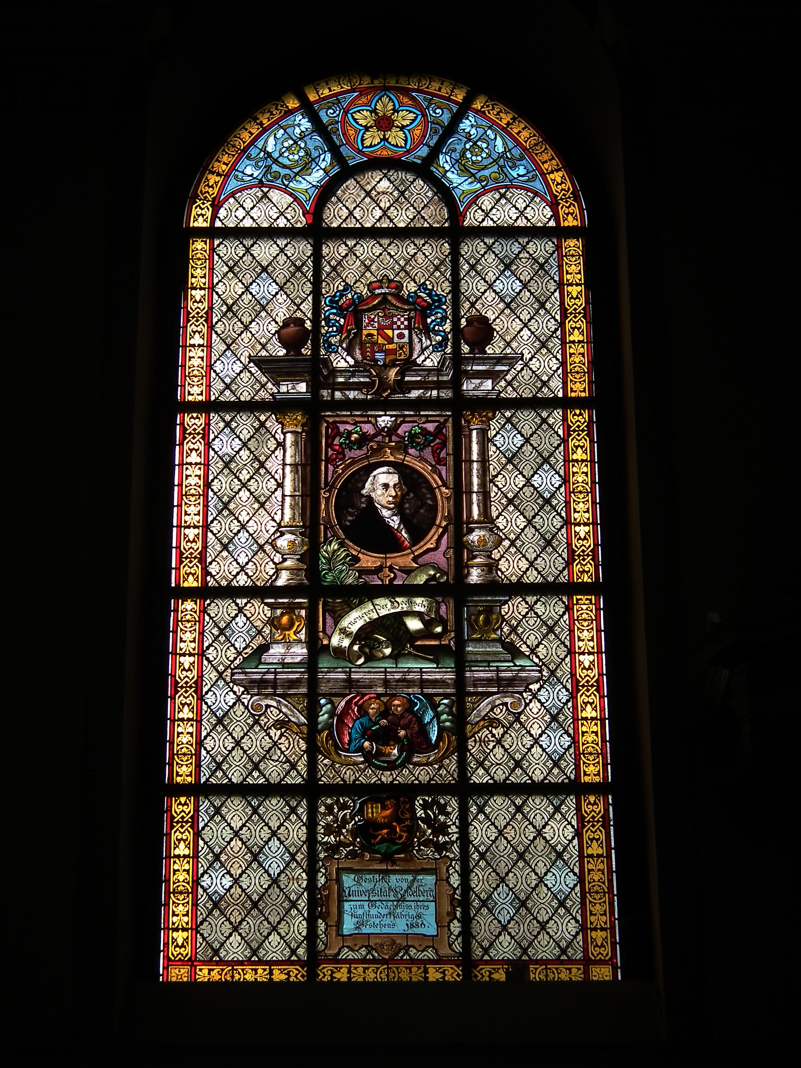 Kirchenfenster in der Providenzkirche in Heidelberg (Baden-Württemberg, Deutschland). Dargestellt: Markgraf Karl Friedrich von Baden, darüber markgräfliches Wappen (wie es bis 1803 geführt wurde), darunter Wappen der Universität Heidelberg; Fenster von 1886.